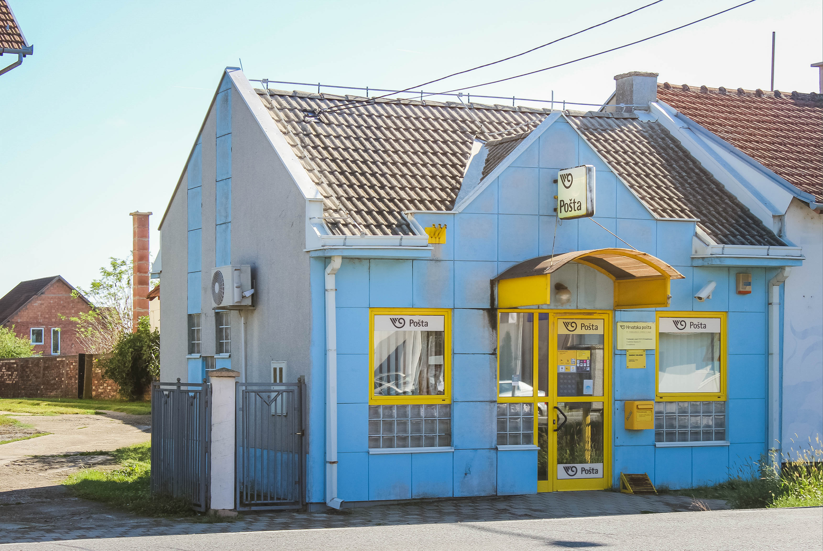 Poštanski ured u Ernestinovu